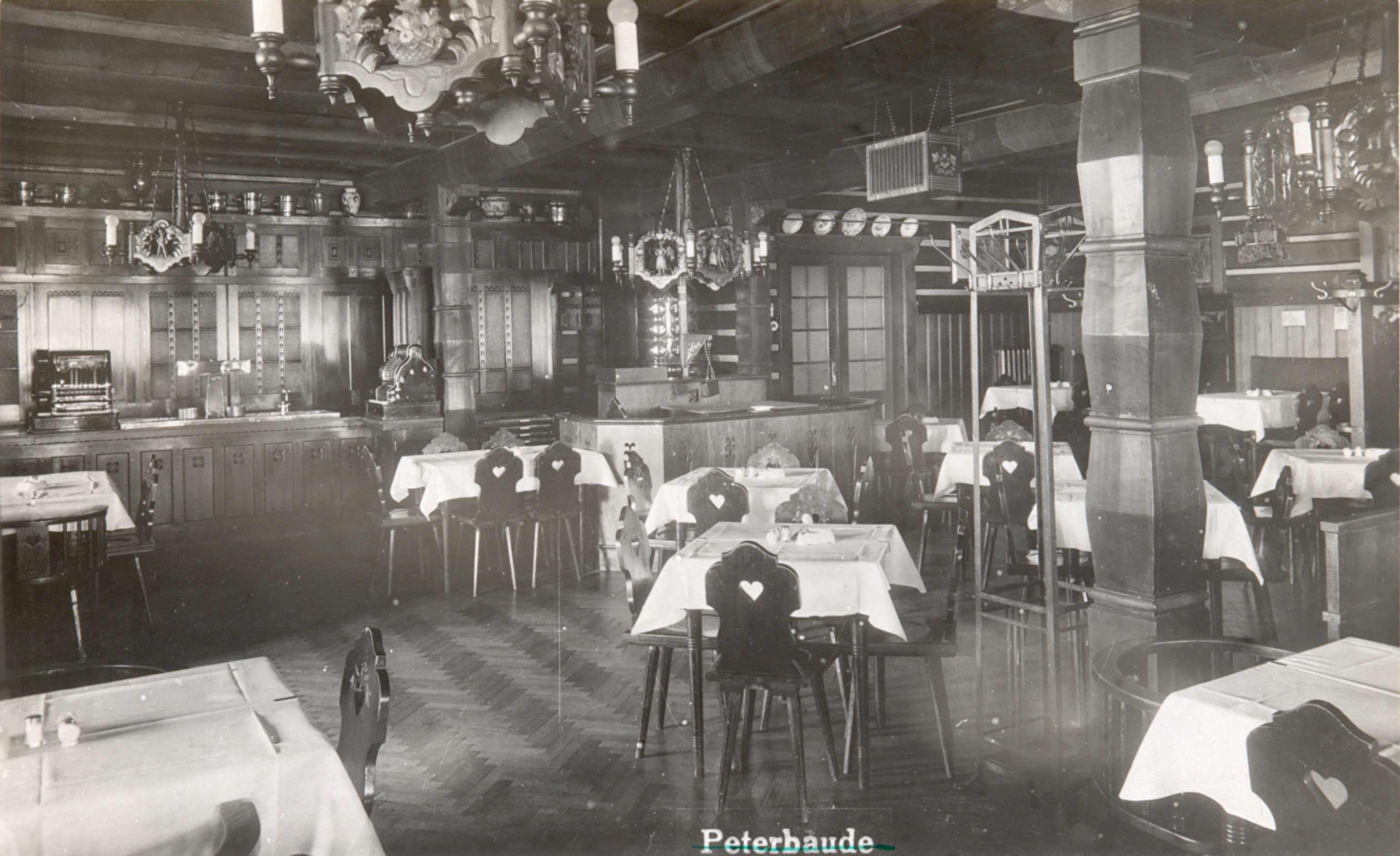 Petrova bouda